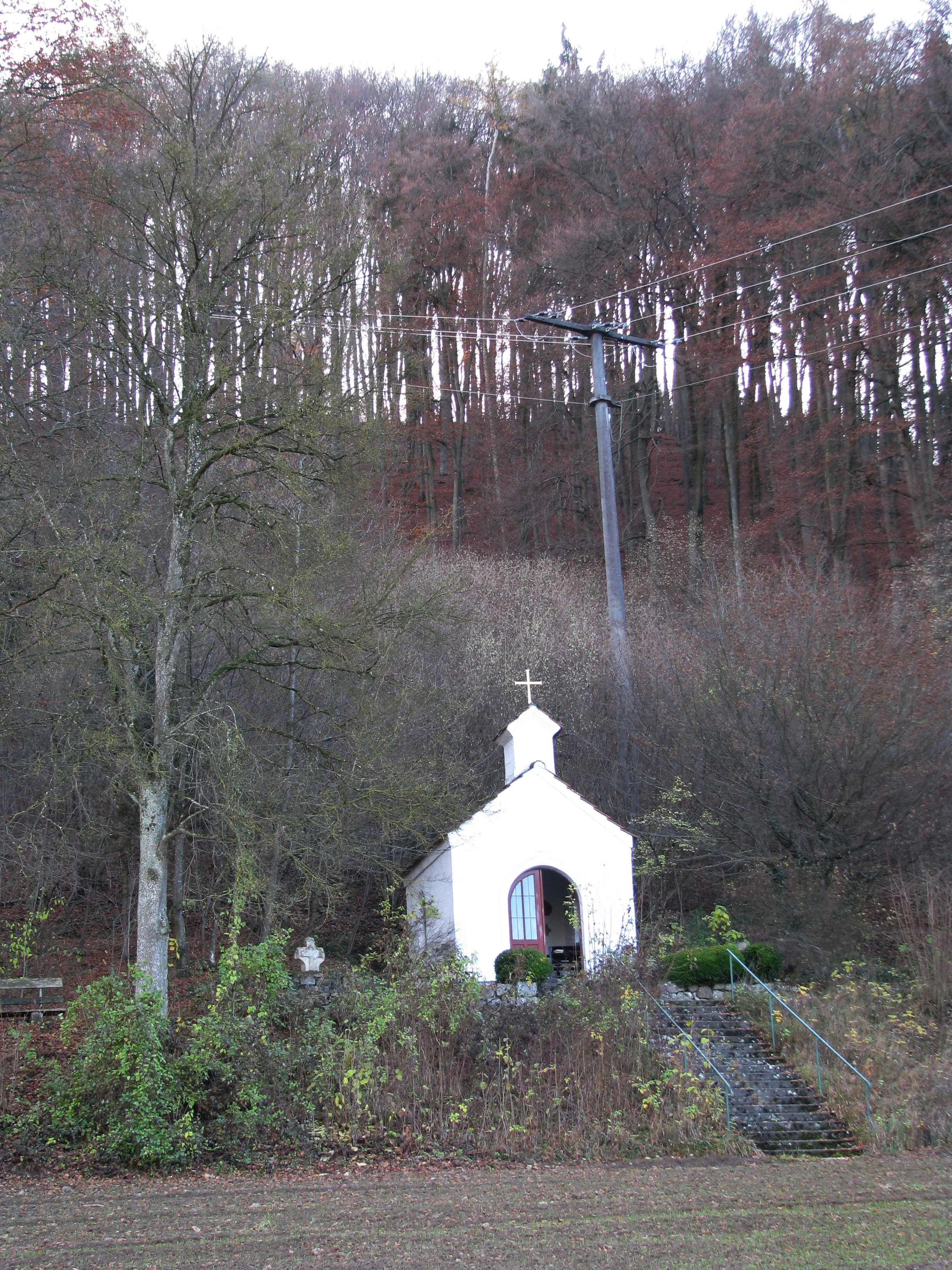 Pietenfeld a. d. Leithen, Ortsteil von Eichstätt